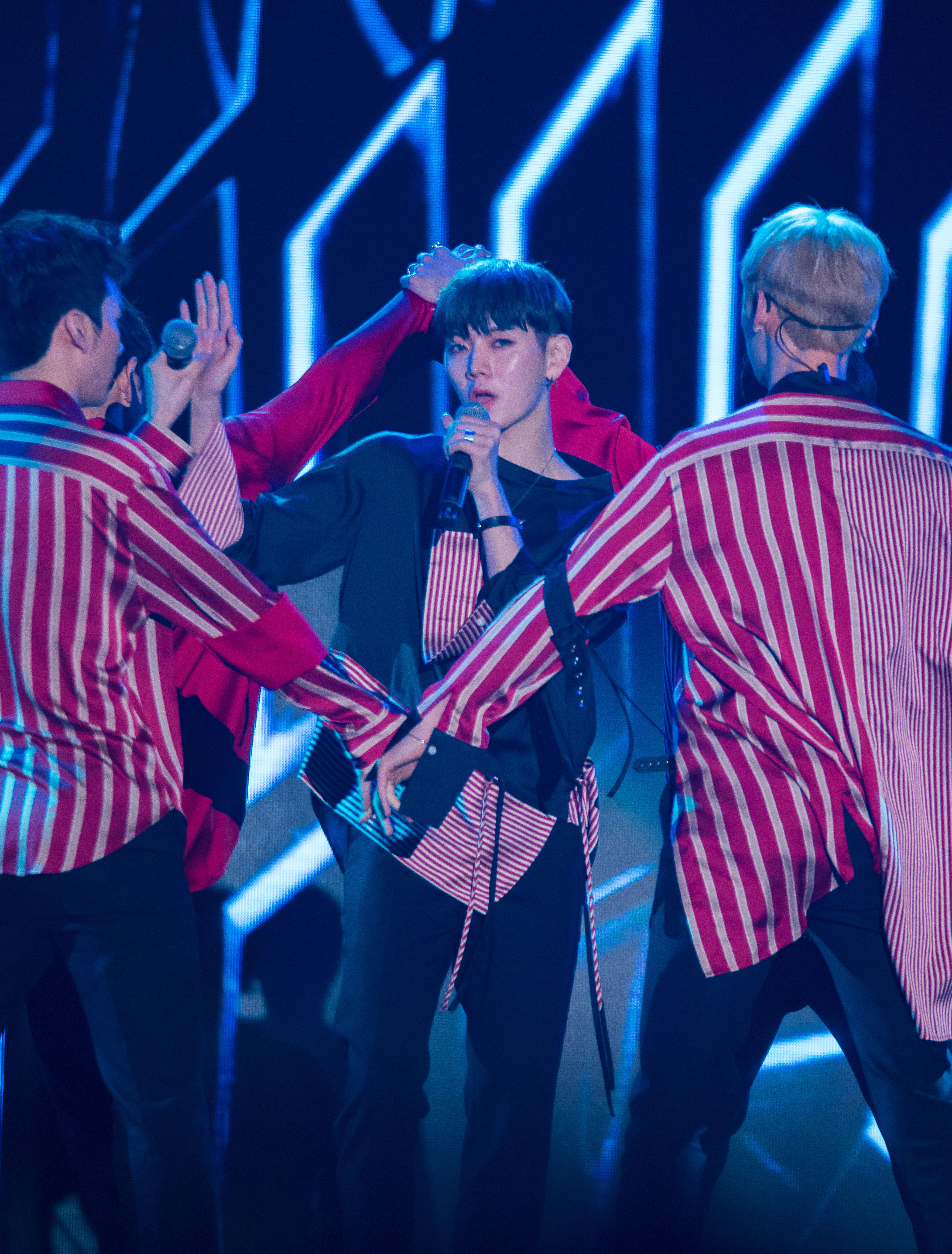 20161002 뉴이스트 점프 구로 아시아